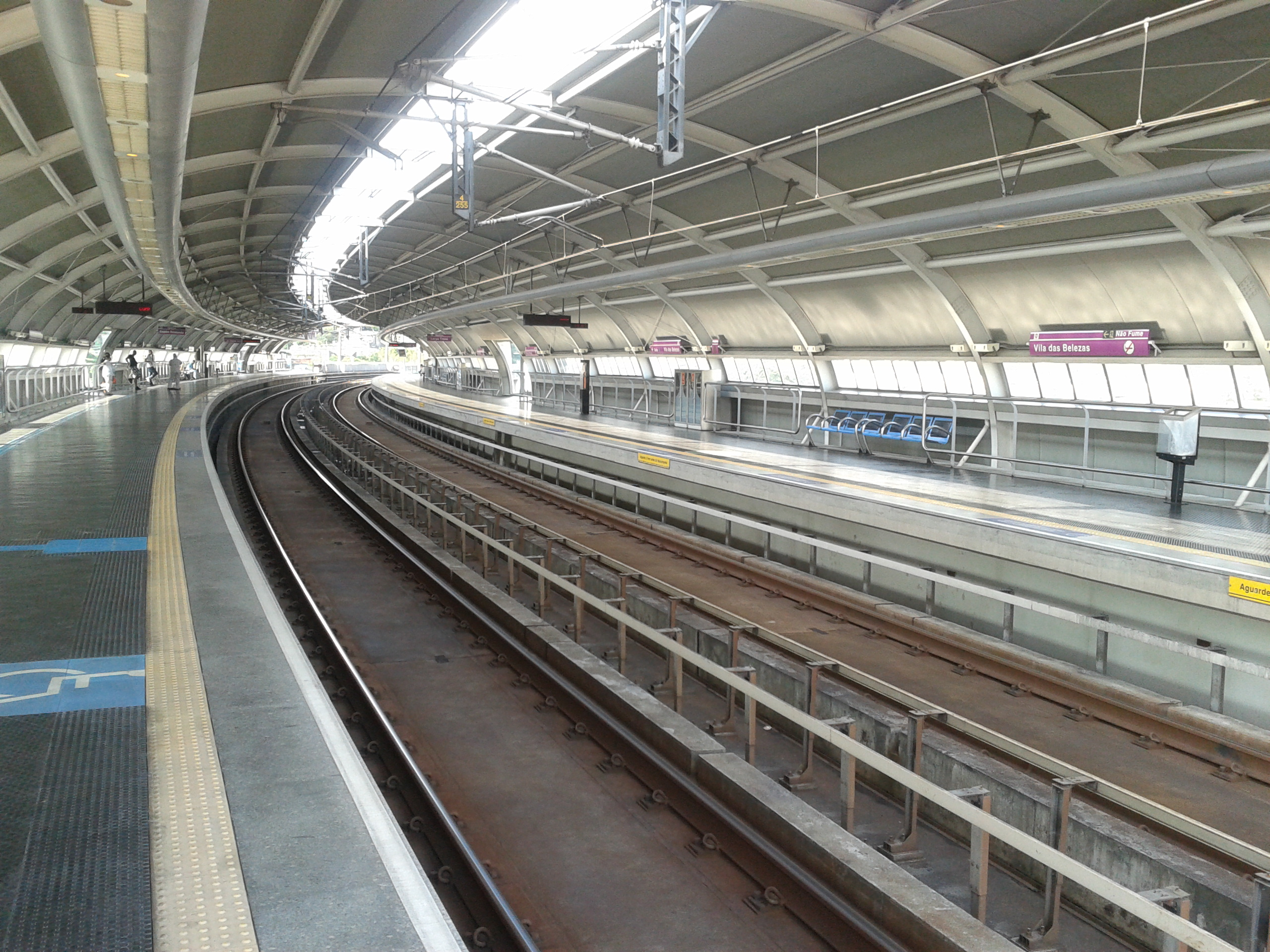 Vista da plataforma da estação Vila das Belezas, da Linha 5 - Lilás, do Metrô de São Paulo.